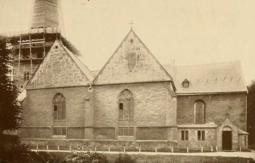 Alte Evangelische Kirche Gütersloh